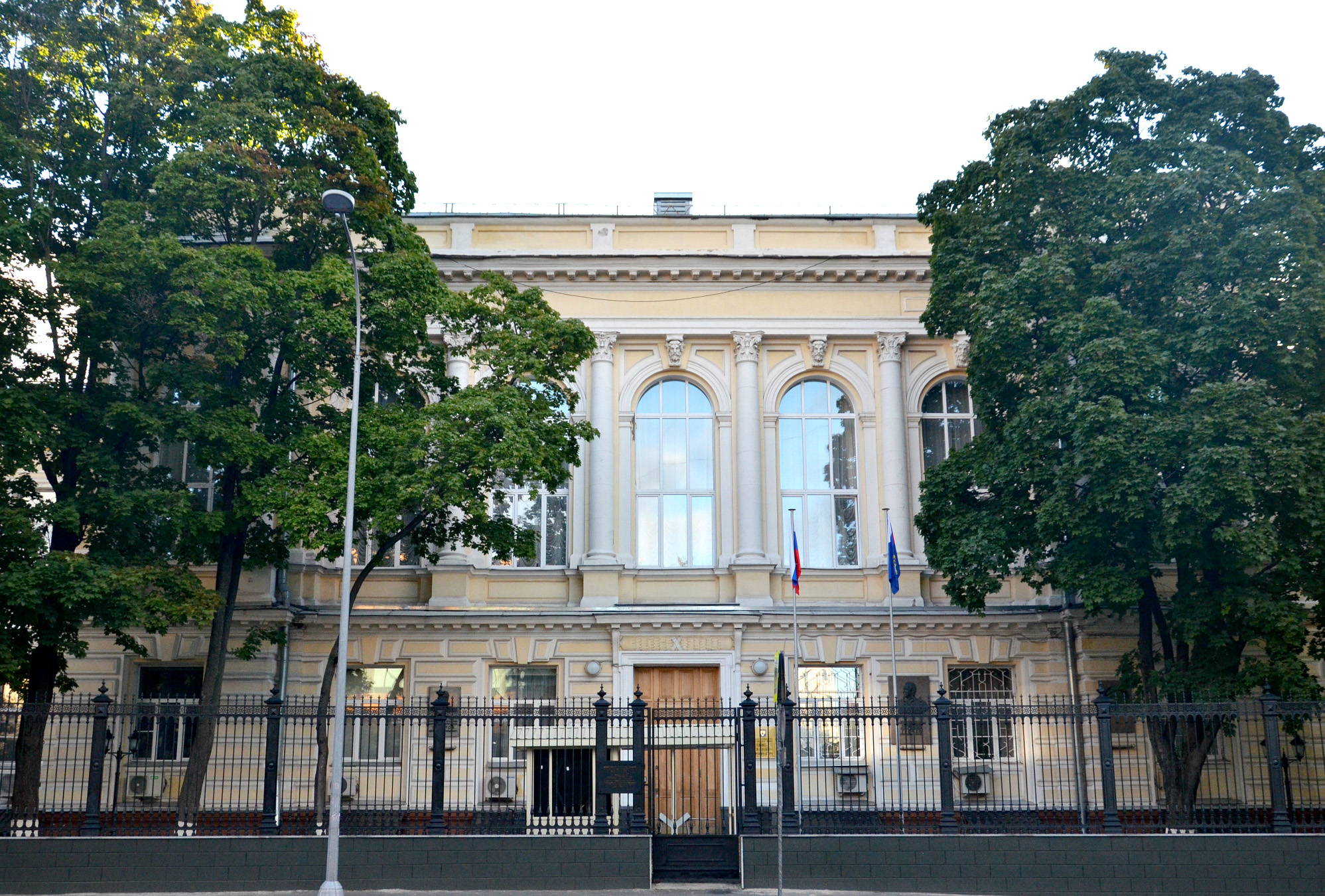 Здание Главной военной прокуратуры